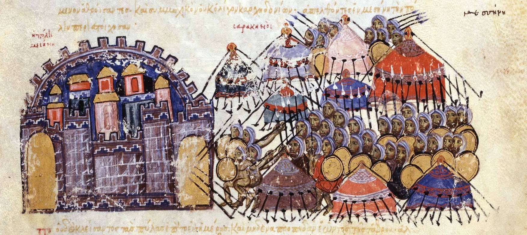 Arab siege of Messina, defended by Katakalon Kekaumenos, in 1040